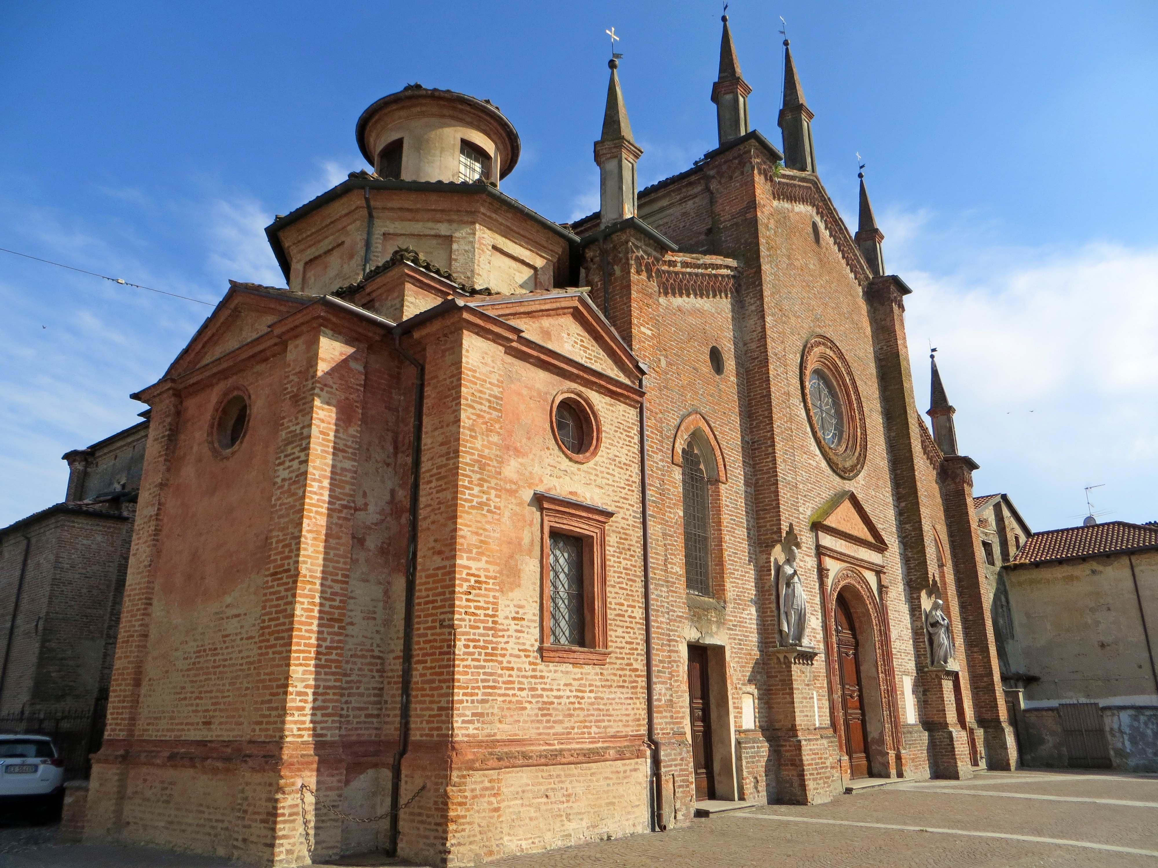 Chiesa dei Santi Gervasio e Protasio (Zibello) - facciata